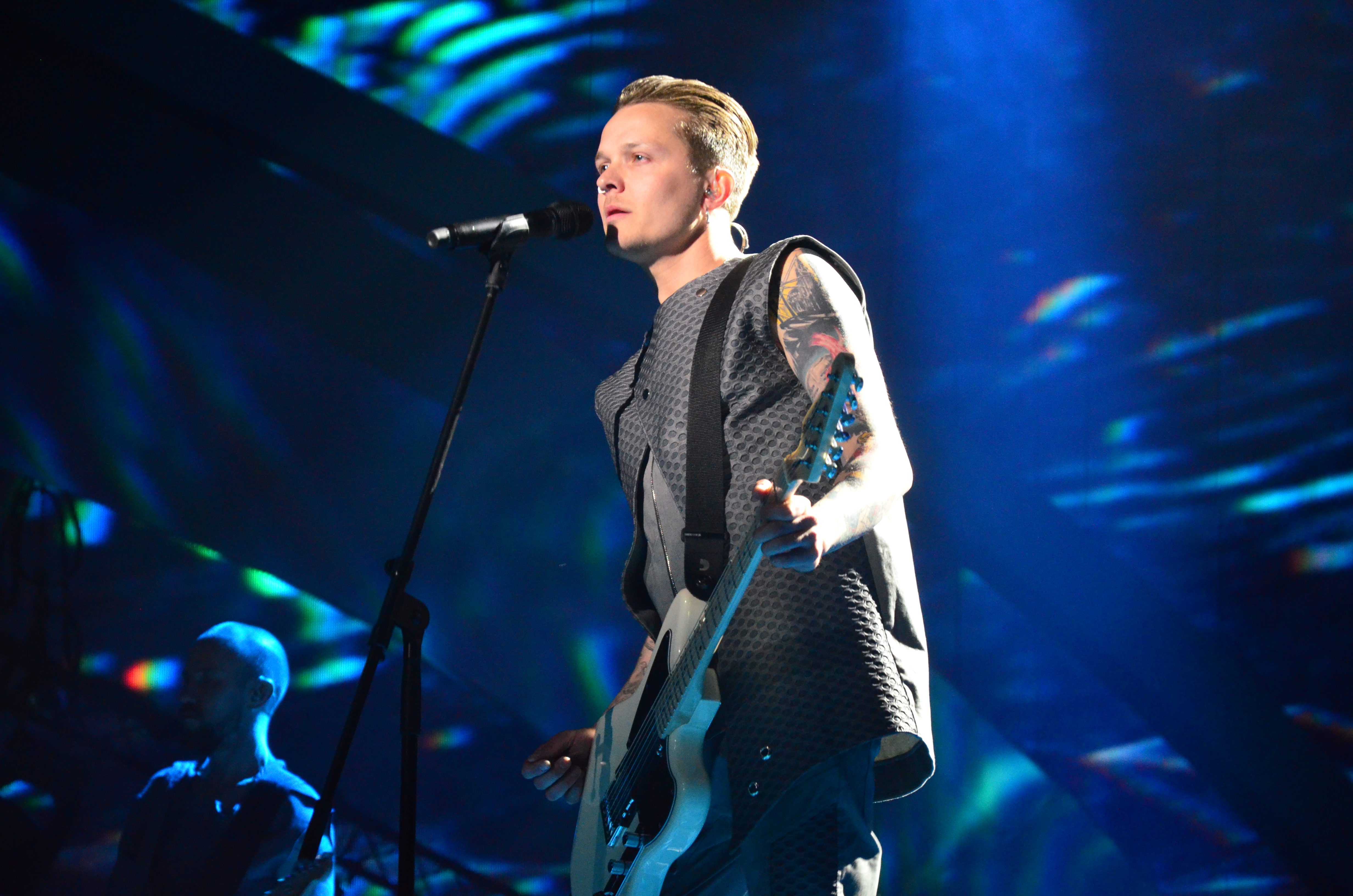 10 травня 2017 року у Києві відбулась генеральна репетиція 2 півфіналу "Євробачення".